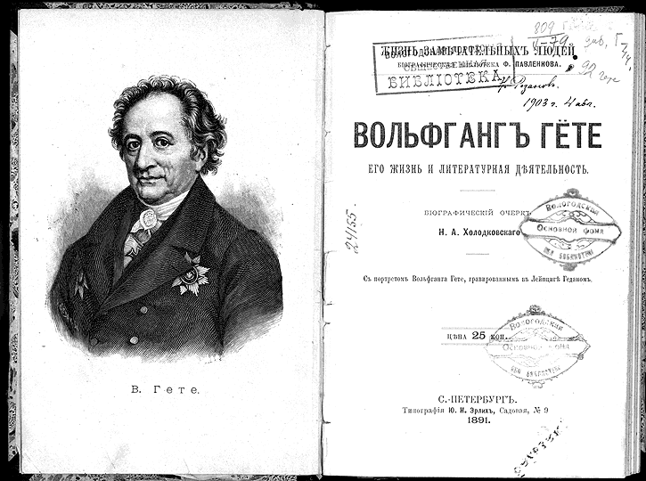 Разворот книги Холодковского о Гёте в серии «ЖЗЛ».